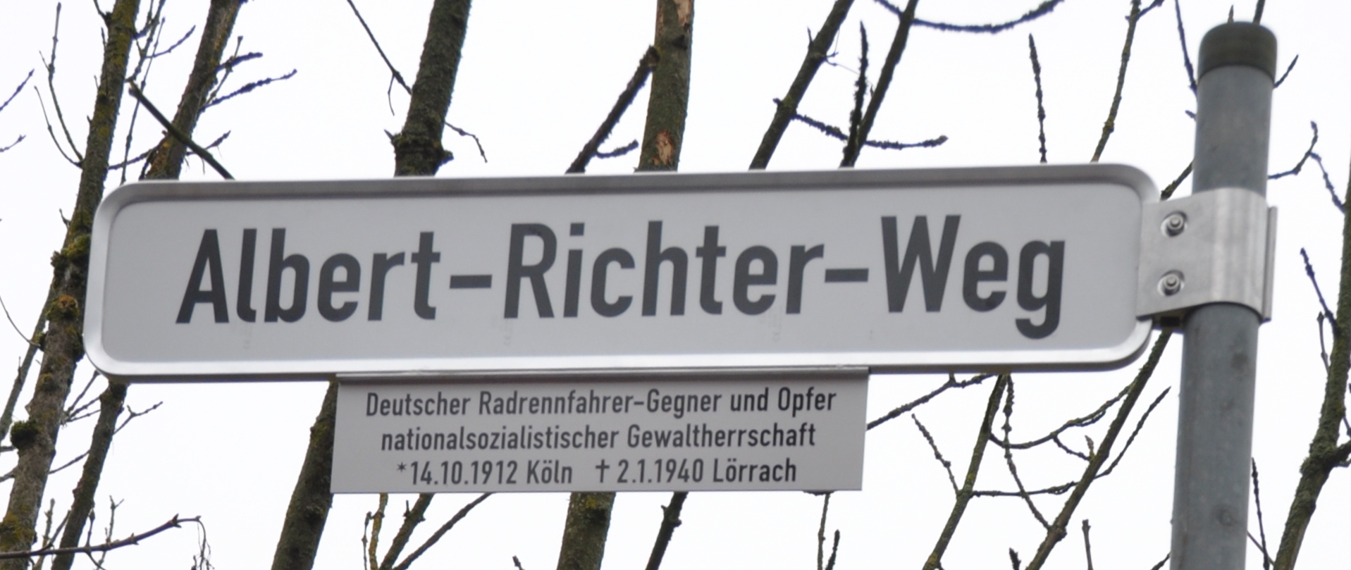 Straßenschild "Albert-Richter-Weg" in Schwalbach am Taunus